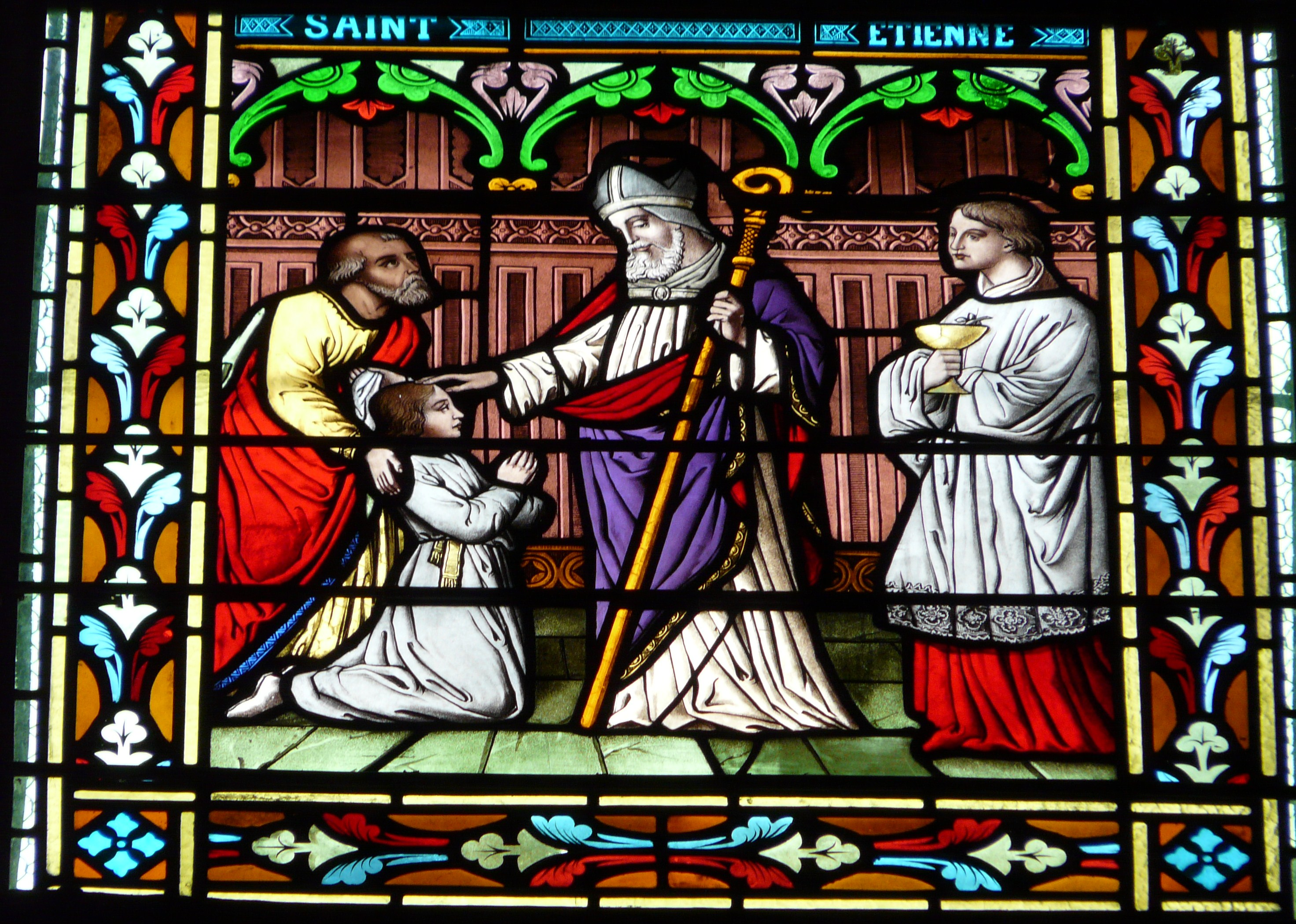 Œuvre de 1887 de Jules Maumejean. Détail d'un vitrail du chœur de l'église Notre-Dame, Cauterets, Hautes-Pyrénées, France.